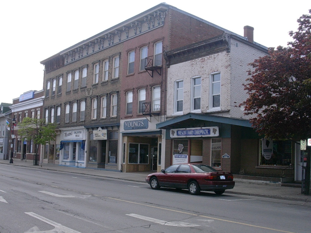 Prescott, Ontario, Canada